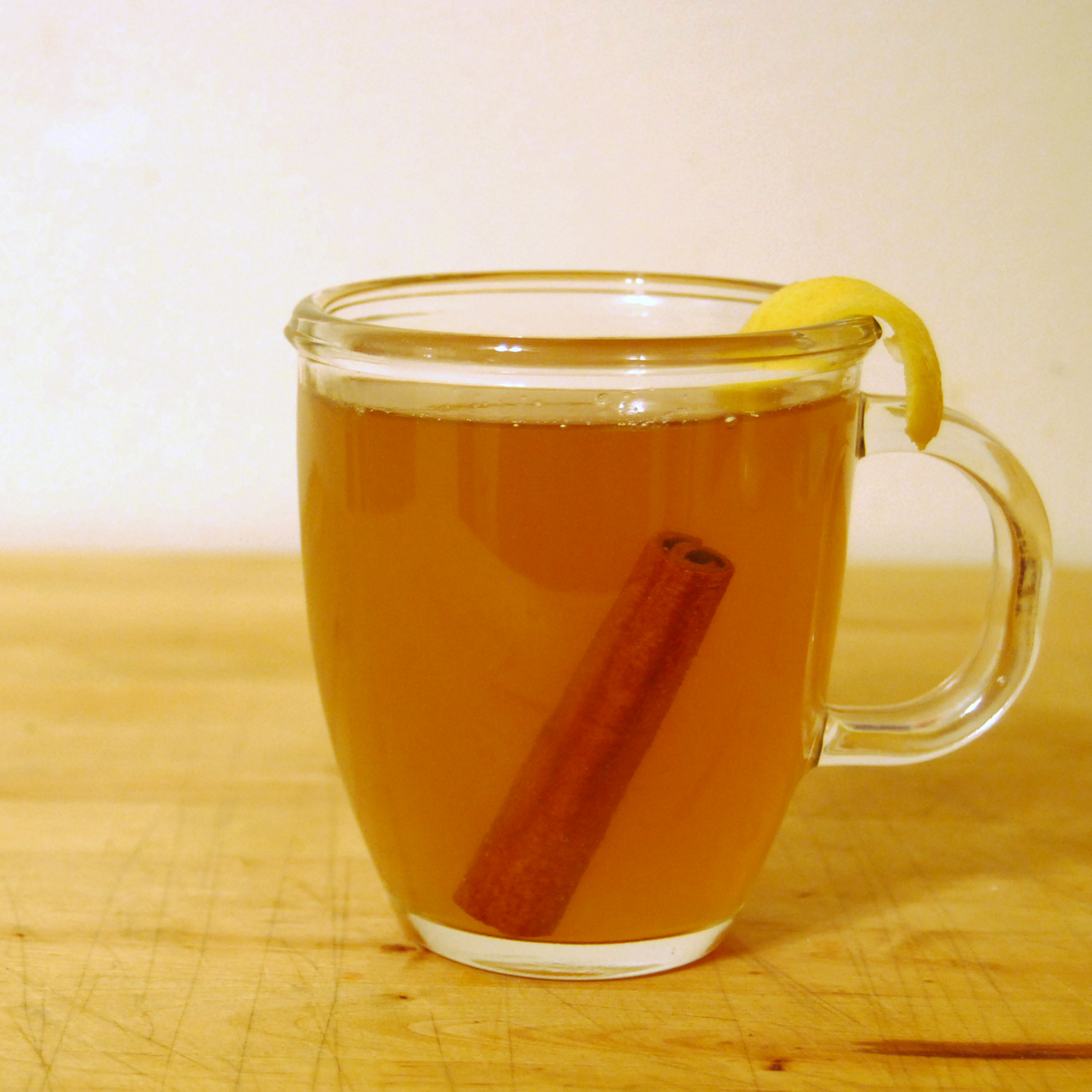 A hot toddy